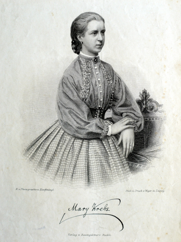 Mary Krebs-Brenning auf einem Stahlstich von August Weger (1823–1892), nach einer Fotografie von Franz Hanfstaengl. Verlag: Baumgärtners Buchhandlung, Leipzig.